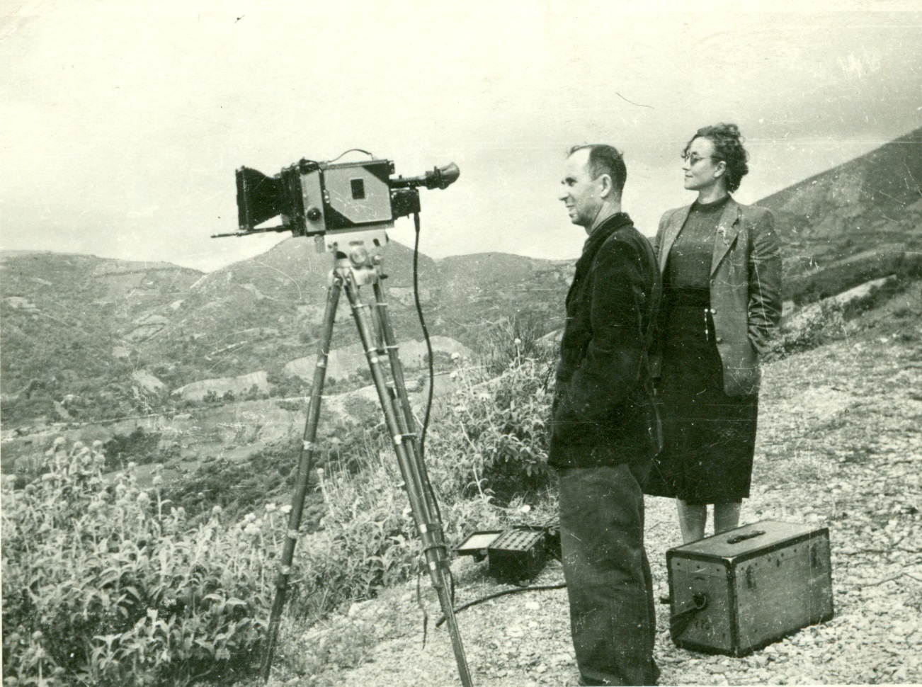 Выбор натуры к фильму "Великий воин Албании Скандербег": оператор комбинированных съемок Г. Д. Айзенберг с художником Л. Александровской